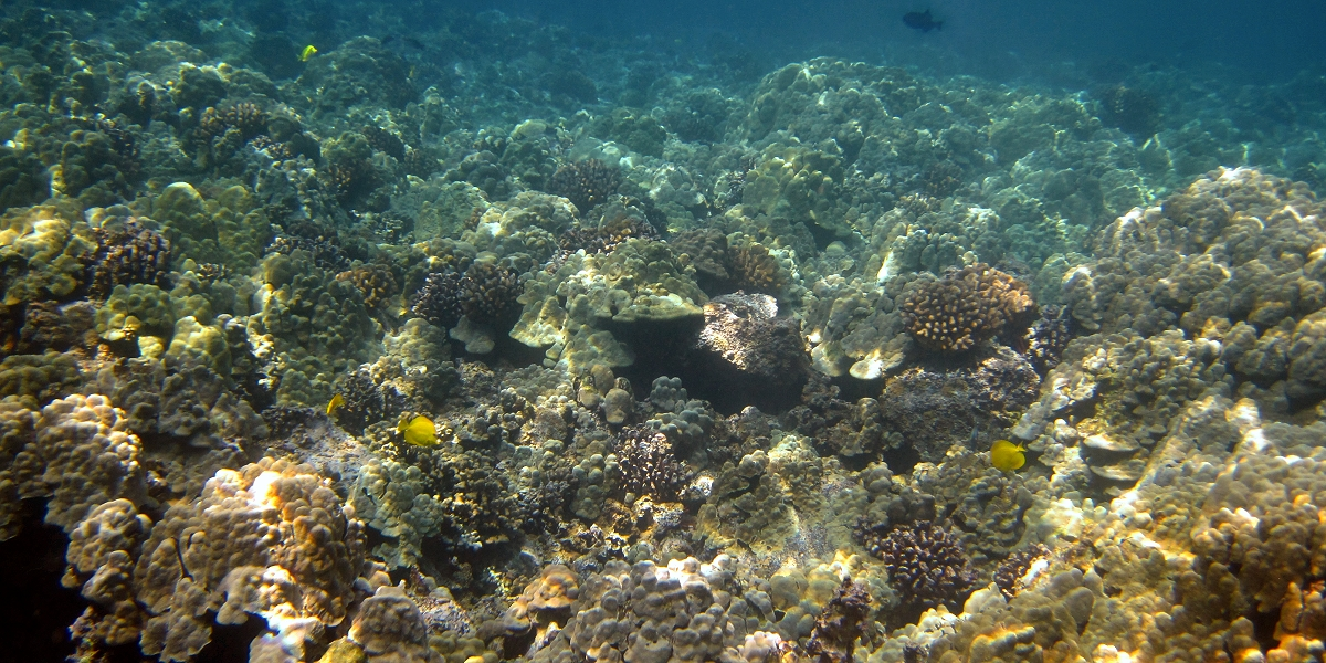 Иллюcтрация для викиучебника Гавайеведение